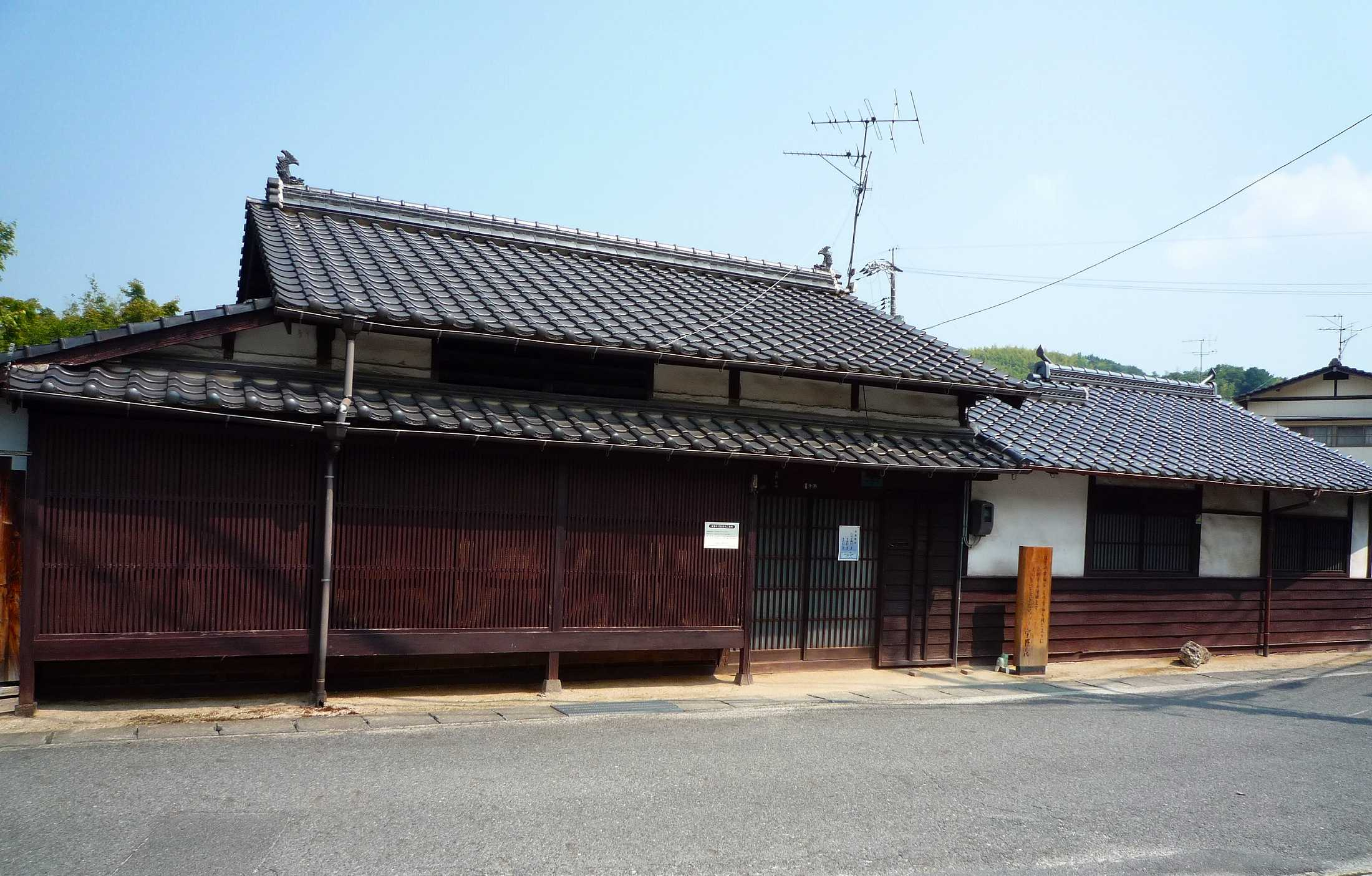 宇野千代生家（山口県岩国市）